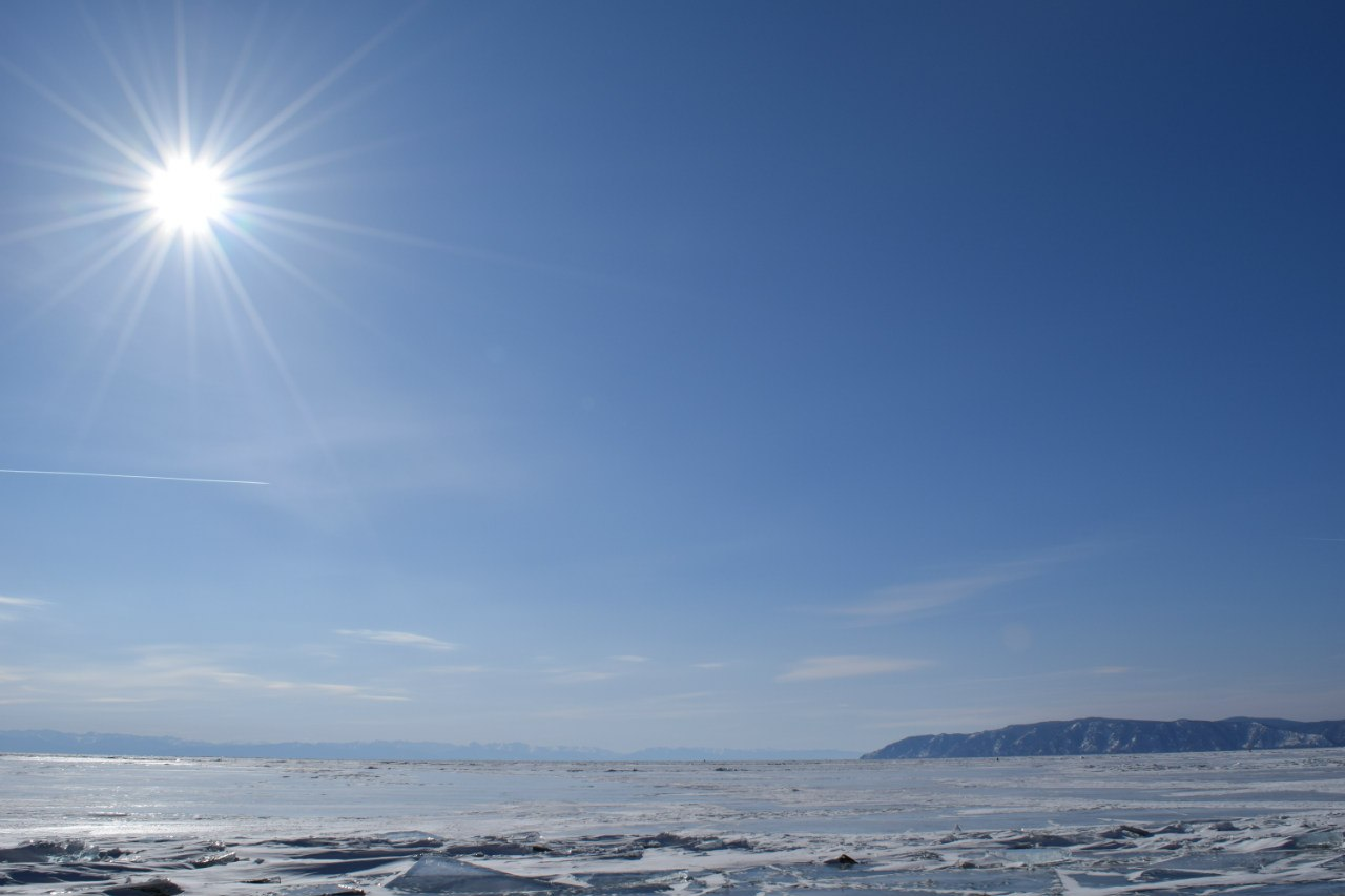 Листвянка, Иркутский район This image is related to the protected area of Russia number 3810100